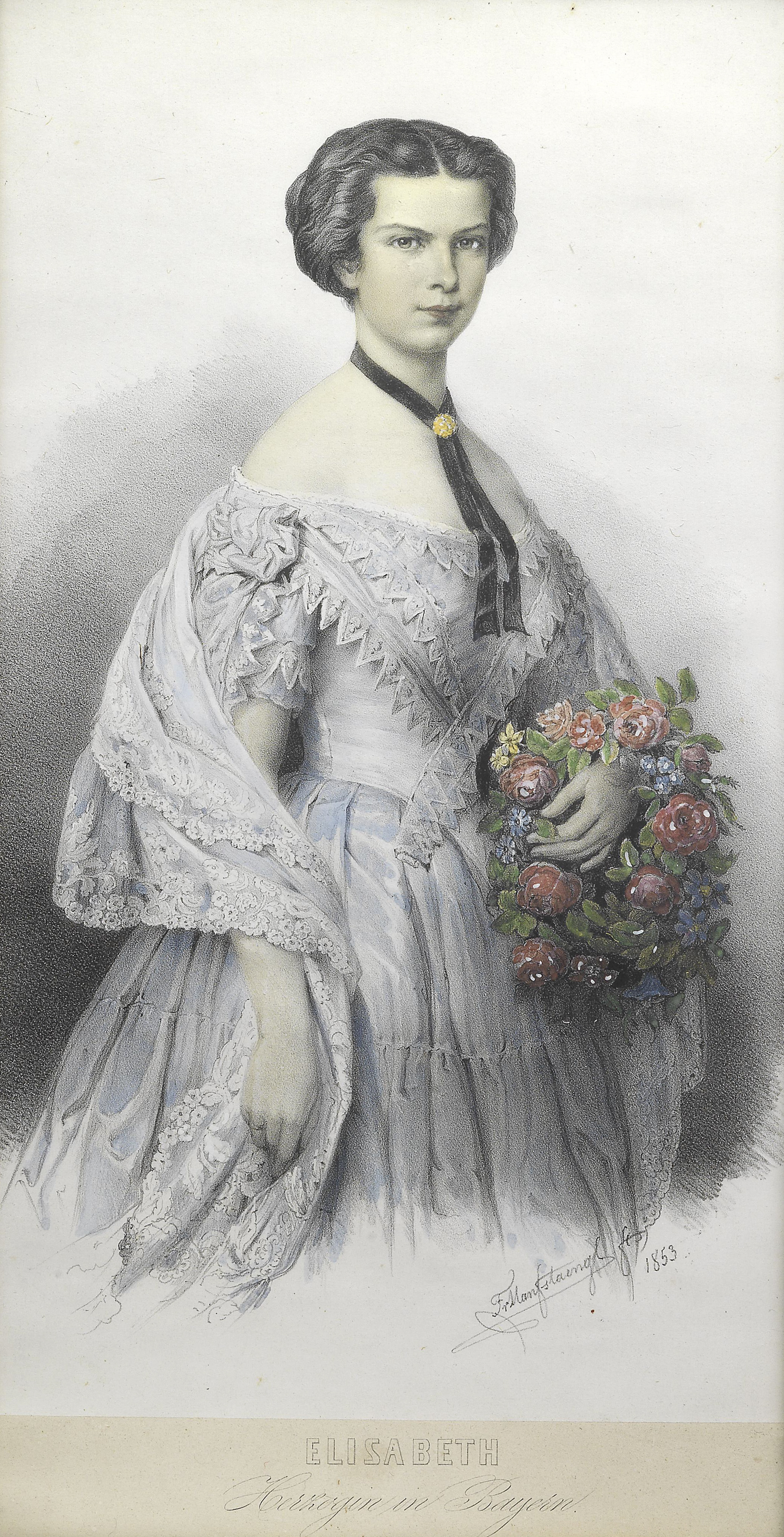 Kaiserin Elisabeth als Braut, kolorierte Lithographie, 38 x 22 cm